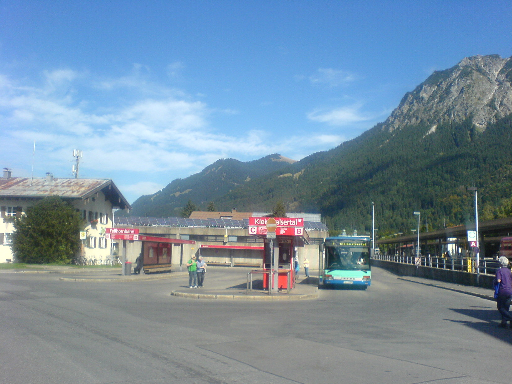 Germany